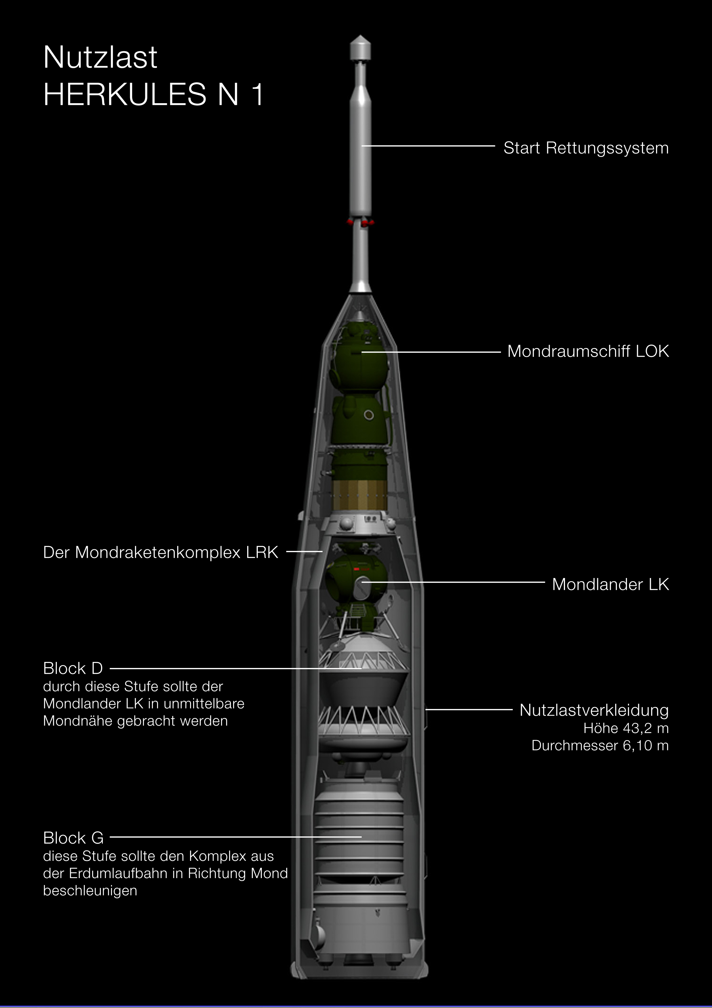 Darstellung der Nutzlaststufe der russischen Mondrakete N 1 Herkules